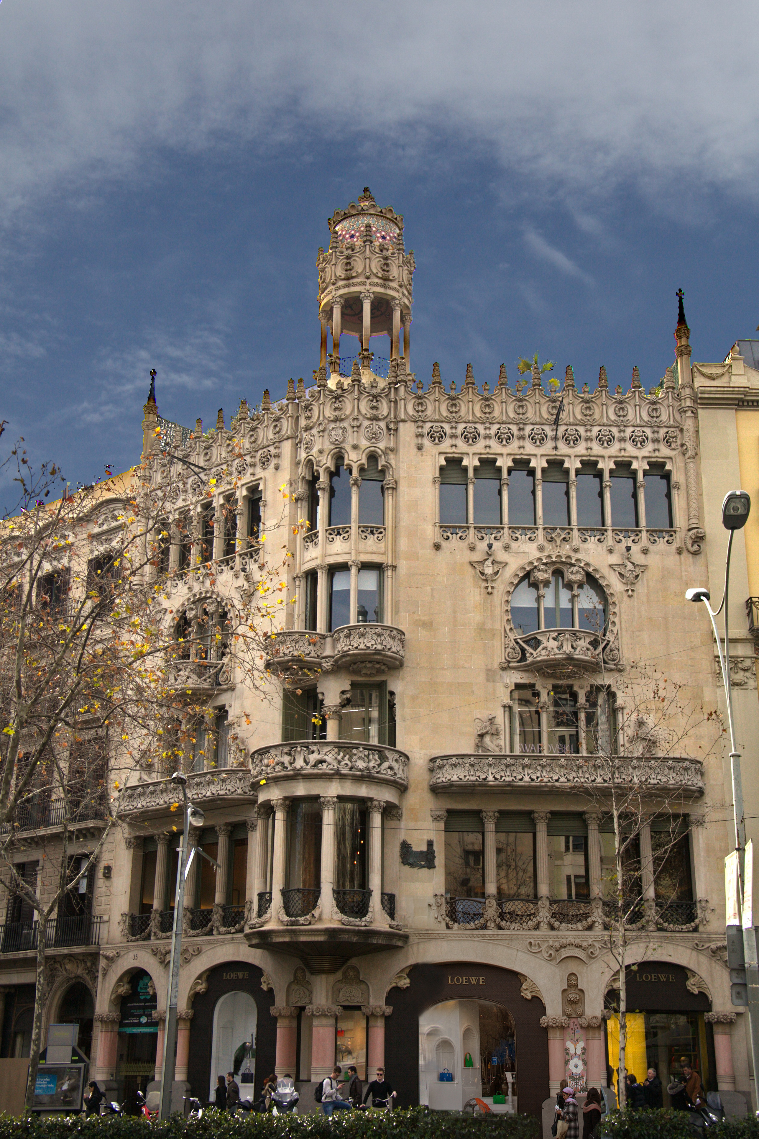 Casa Lleó Morera (Barcelona). Vista general.